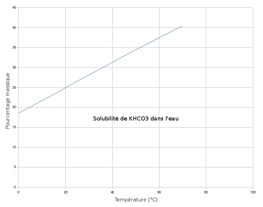 Solubilité du bicarbonate de potasium dans l'eau en fonction de la température